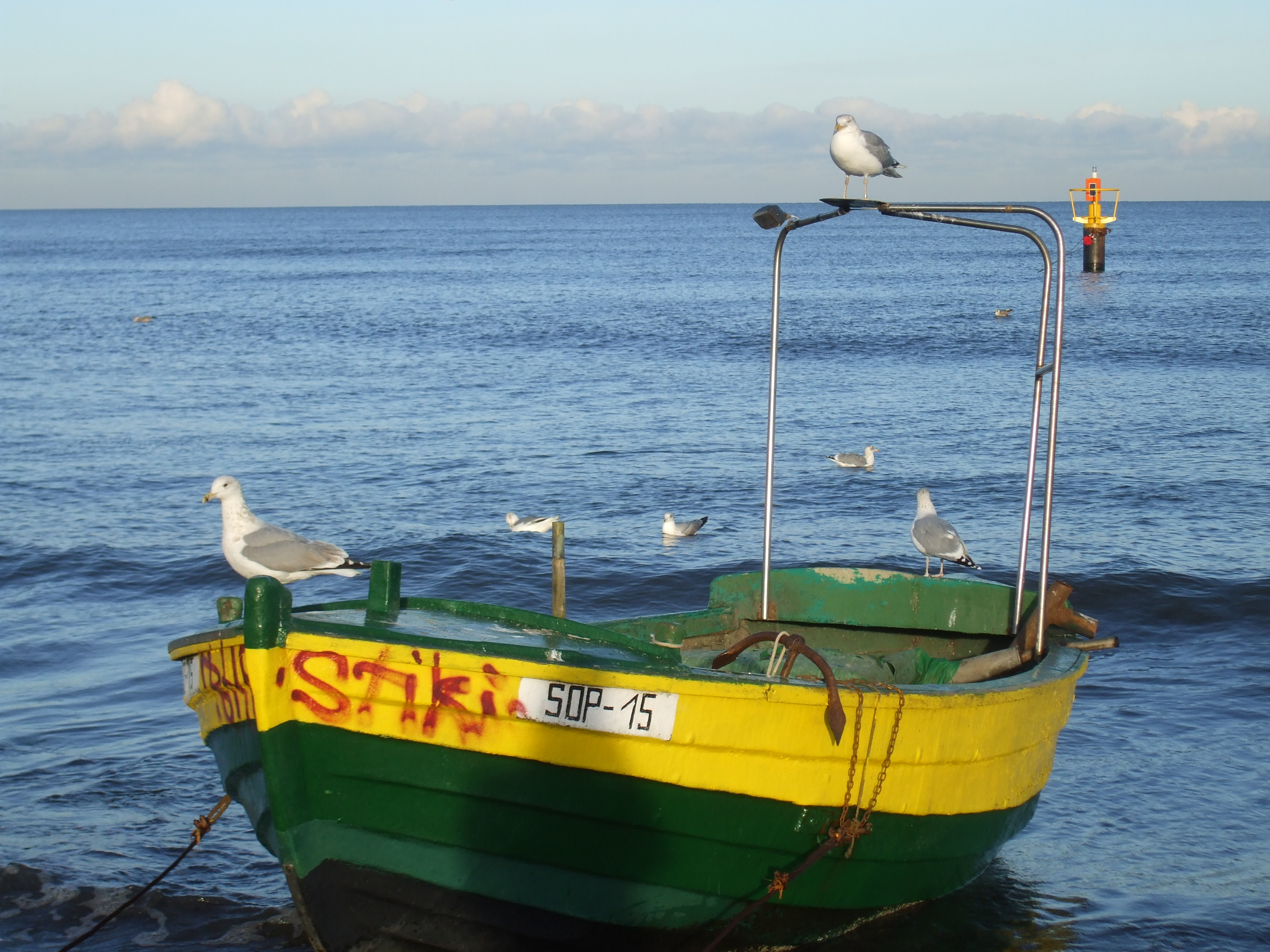 Sopot.